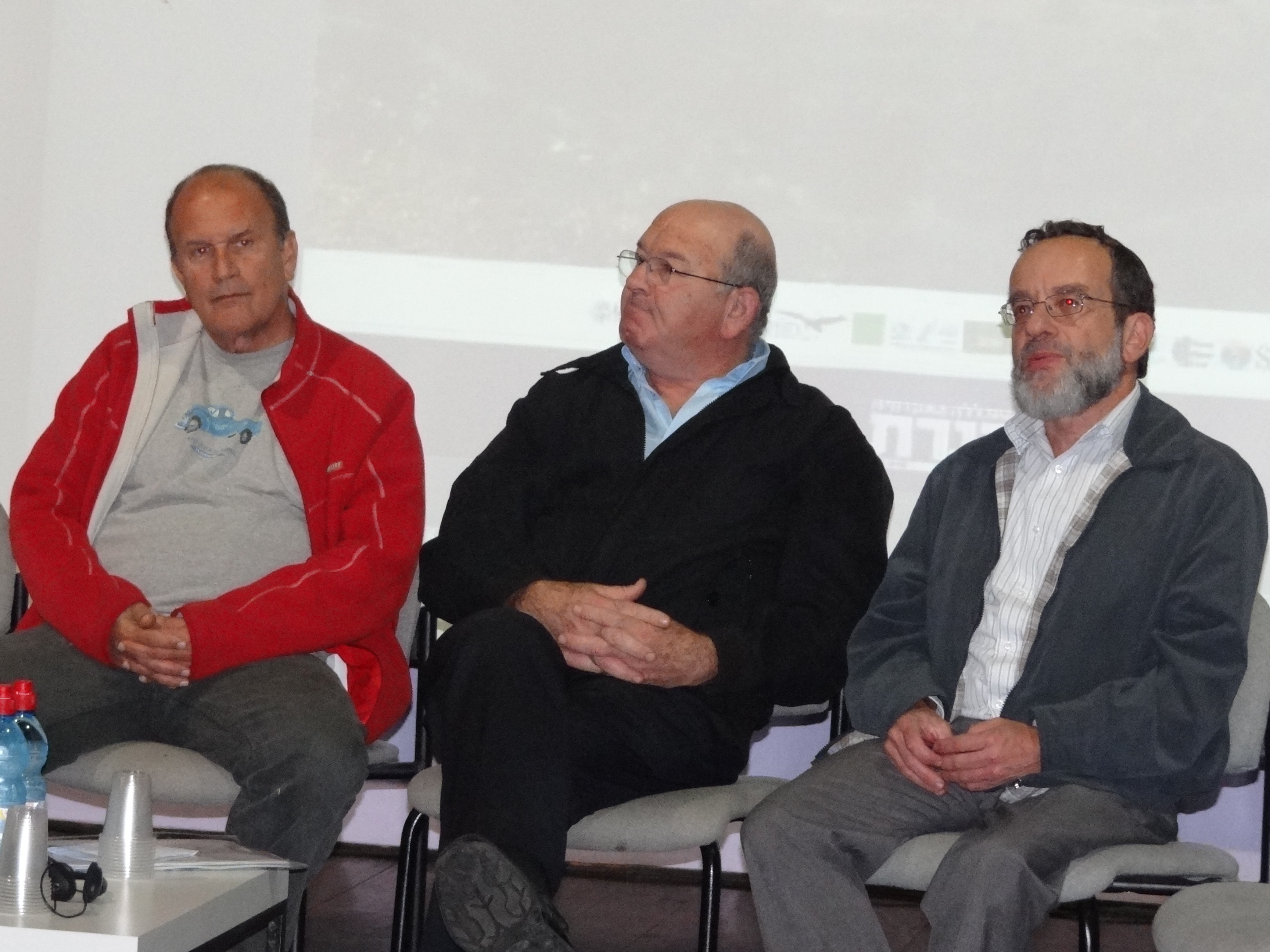 Conference Hopes and Challenges for the Rehabilitation of the Jordan River in Kinneret College on the Sea of Galilee, on November 16, 2011 with Representatives from Jordan and Palestinian National Authority כנס "הולך ונעלם: תקוות וקשיים בשיקום נהר הירדן" שהתקיים במכללת כנרת בעמק הירדן ב- 16 בנובמבר 2011 ועסק בדרכים לשיקום נהר הירדן התחתון. בכנס שאורגן על ידי ארגון "ידידי כדור הארץ המזרח התיכון,, מכללת כנרת ועמותת "ארץ אהבתי" השתתפו נציגים גם מהרשות הפלסטינית ומירדן. המנחה של המושב הראשון היה דליק ווליניץ. נשאו דברים זאב דרורי, יוסי ורדי ישעיהו בר אור גדעון ברומברג נציגים מירדן והרשות הפלסטינית וגלעד ספיר. בחלק השני התקיים פאנל למידע נוסף כאן במושב הראשון מימין לשמאל ישעיהו בר-אור, יוסי ורדי ודליק ווליניץ